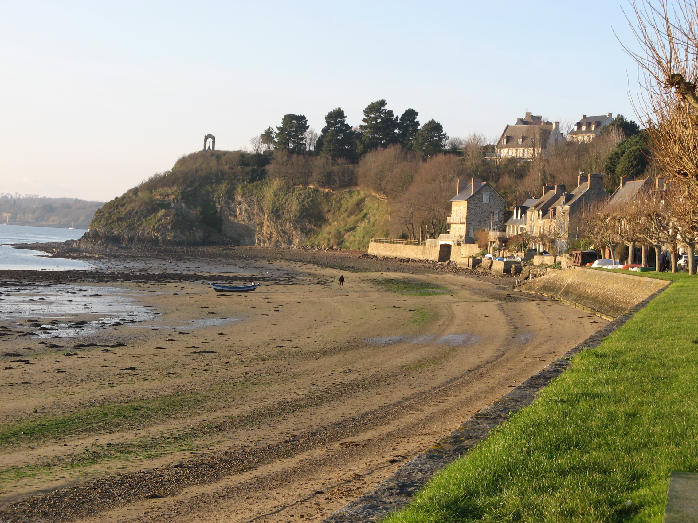 La grève à Saint Suliac